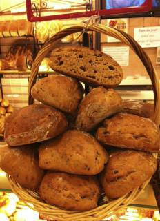 Pain Rustique au levain